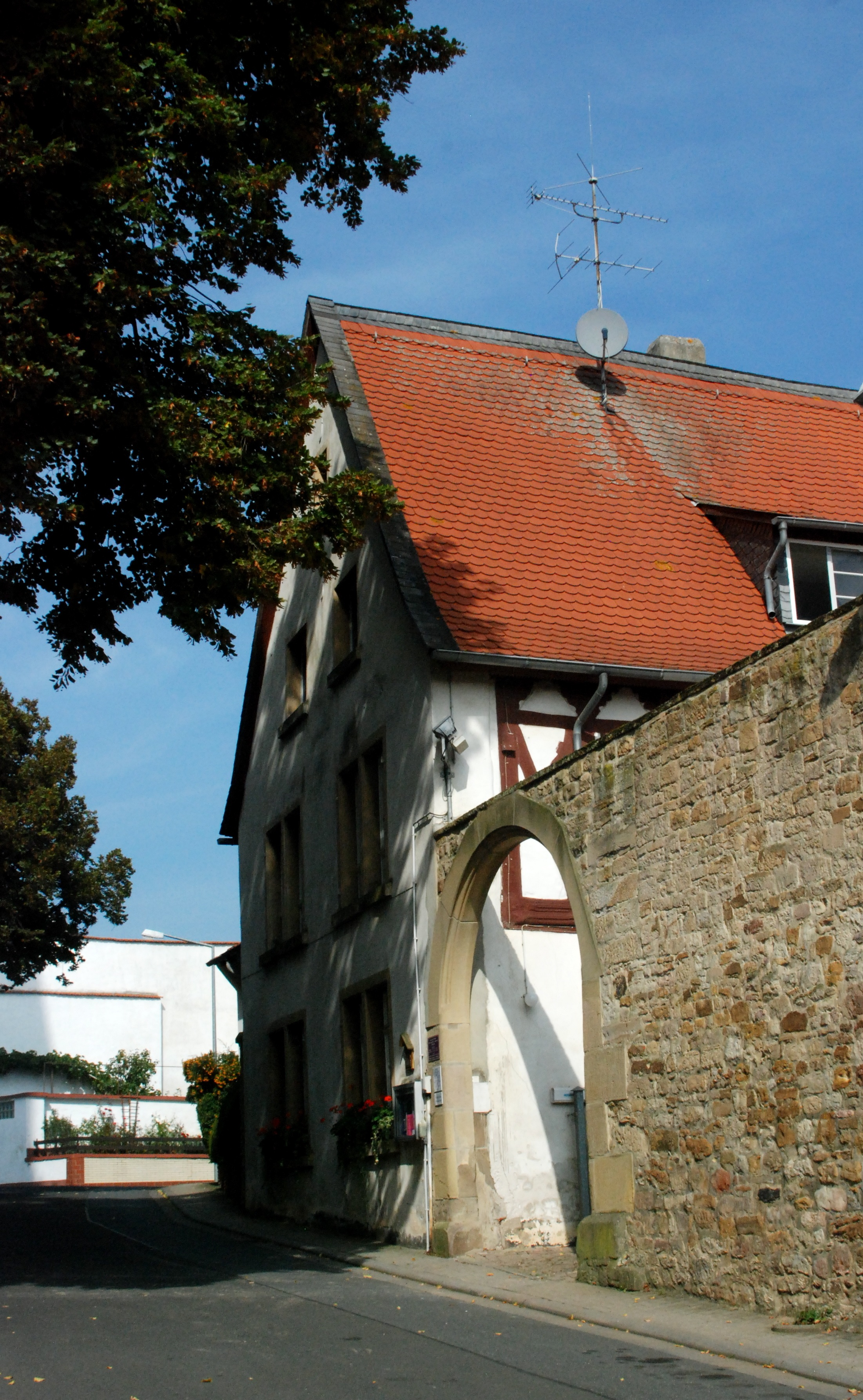 Stein-Bockenheim, historische Pfarrhaus gegenüber der Kirche, Kirchstraße, Fachwerkbau, 17. Jahrhundert, massive Ersetzungen 1865/66, Torbogen 1600